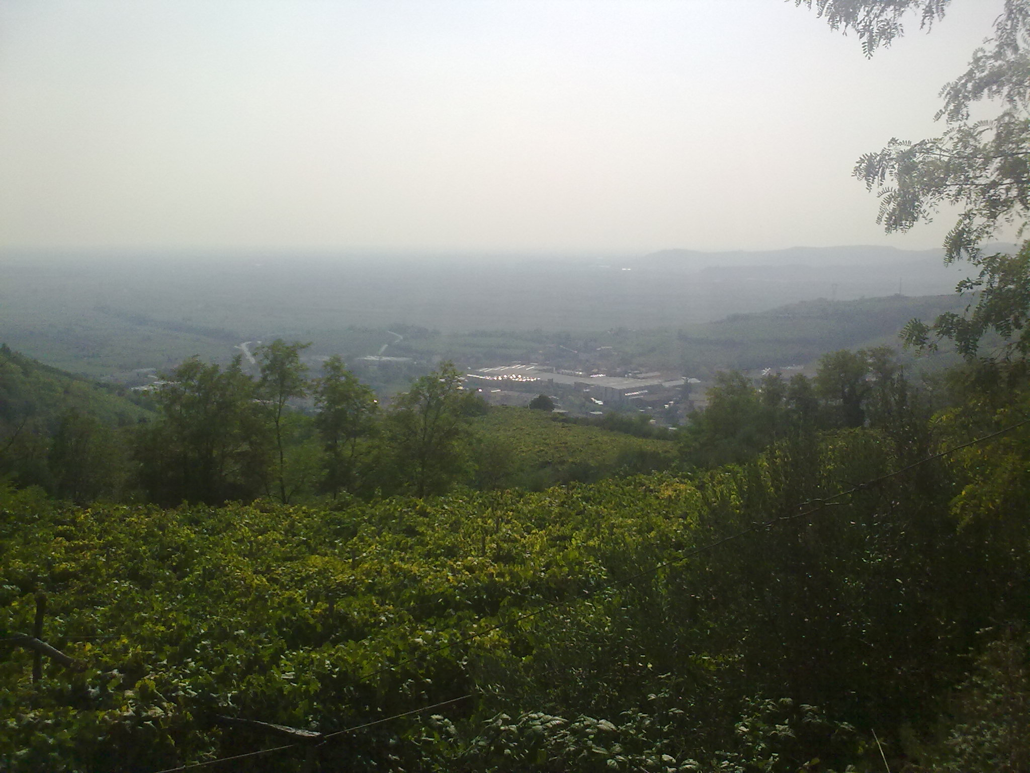 Gambellara, foto scattata da Davide Arsego, (CC-BY-SA-3.0)